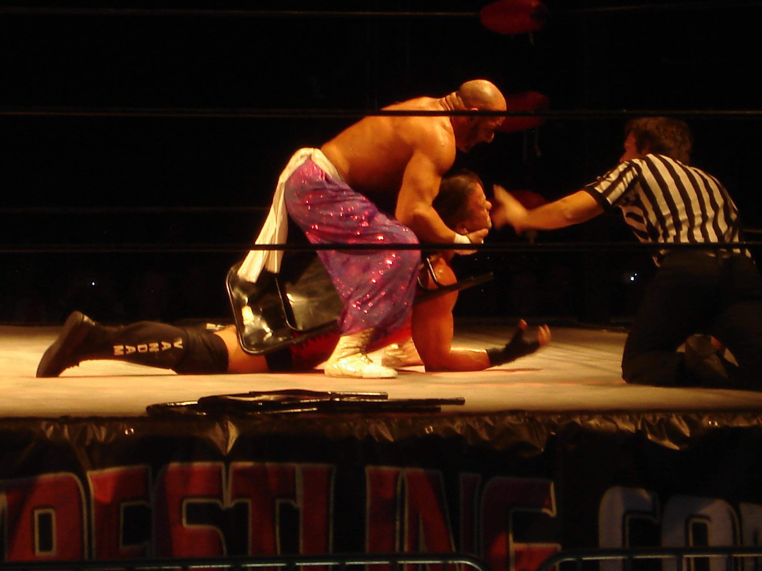 Titelmatch zwischen RVD und Sabu um den Weltmeistertitel von American Wrestling Rampage. Oberhausen 2009